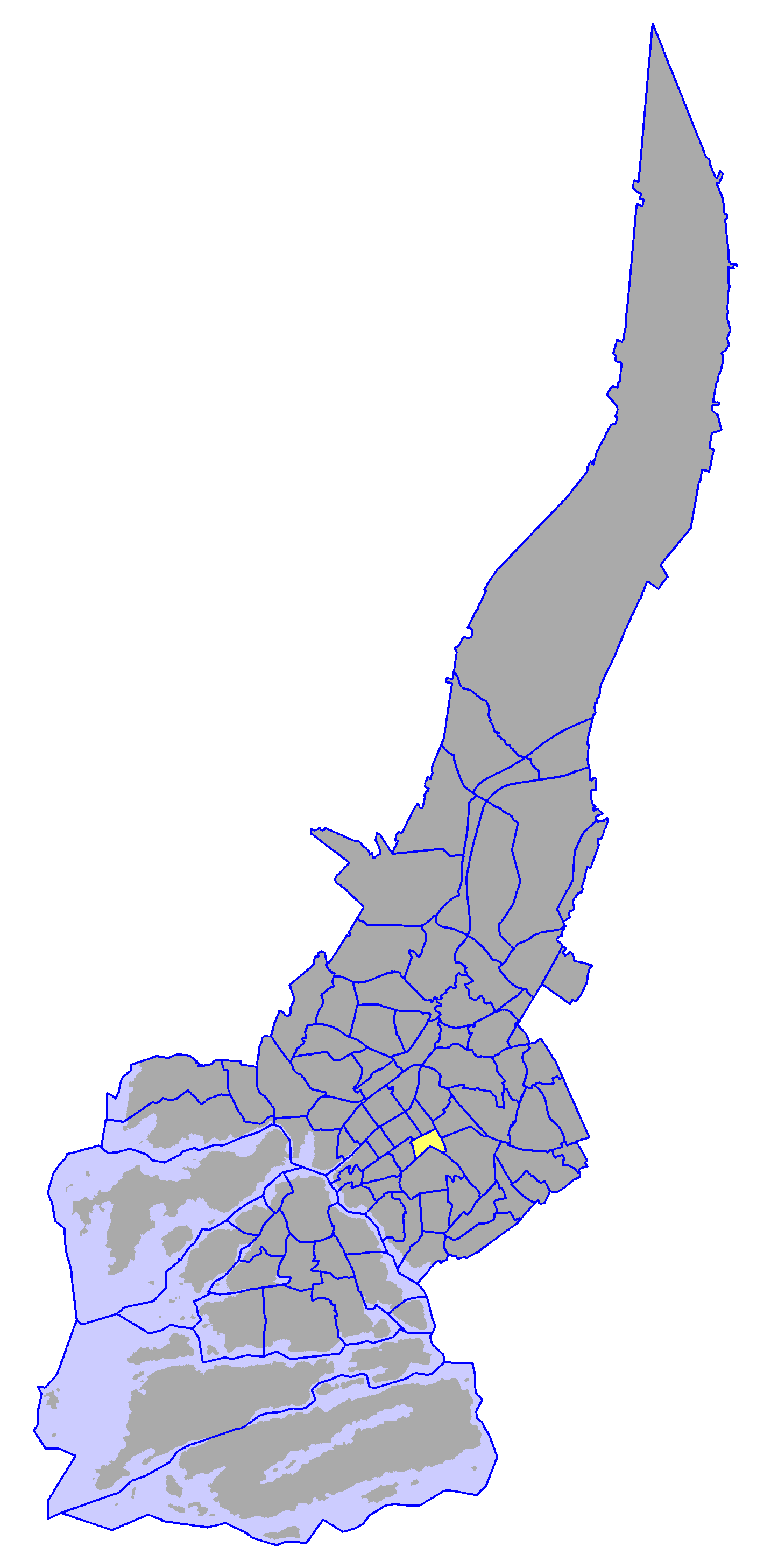 District of Kurjenmäki, in Turku